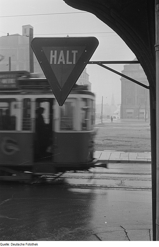 Original image description from the Deutsche FotothekVerkehrszeichen in der Innenstadt